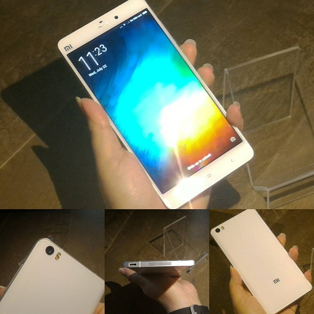 Le Mi Note sous toutes ses coutures.